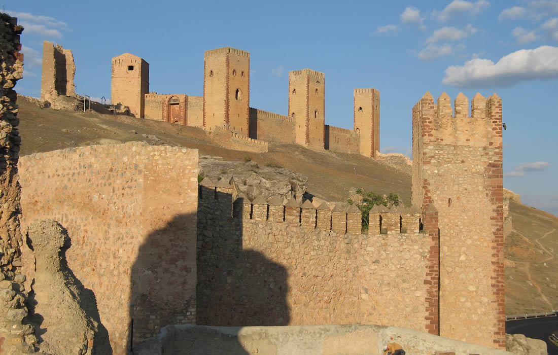 Alcázar de Molina de Aragón. Molina de Aragón (Guadalajara, España)